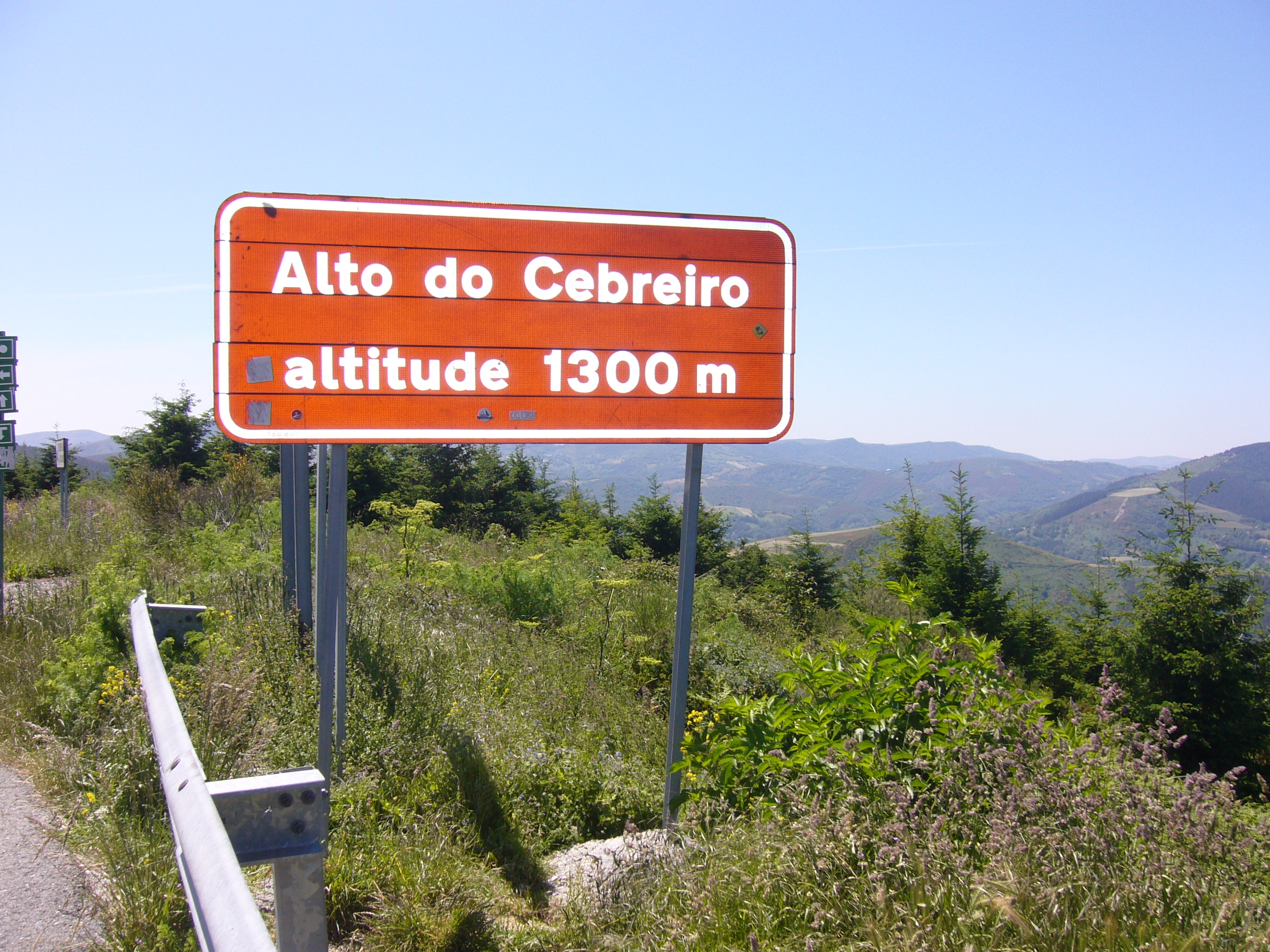 Alto de Cebreiroko errepide txartela Piedrafita de Lugon. Galizia.